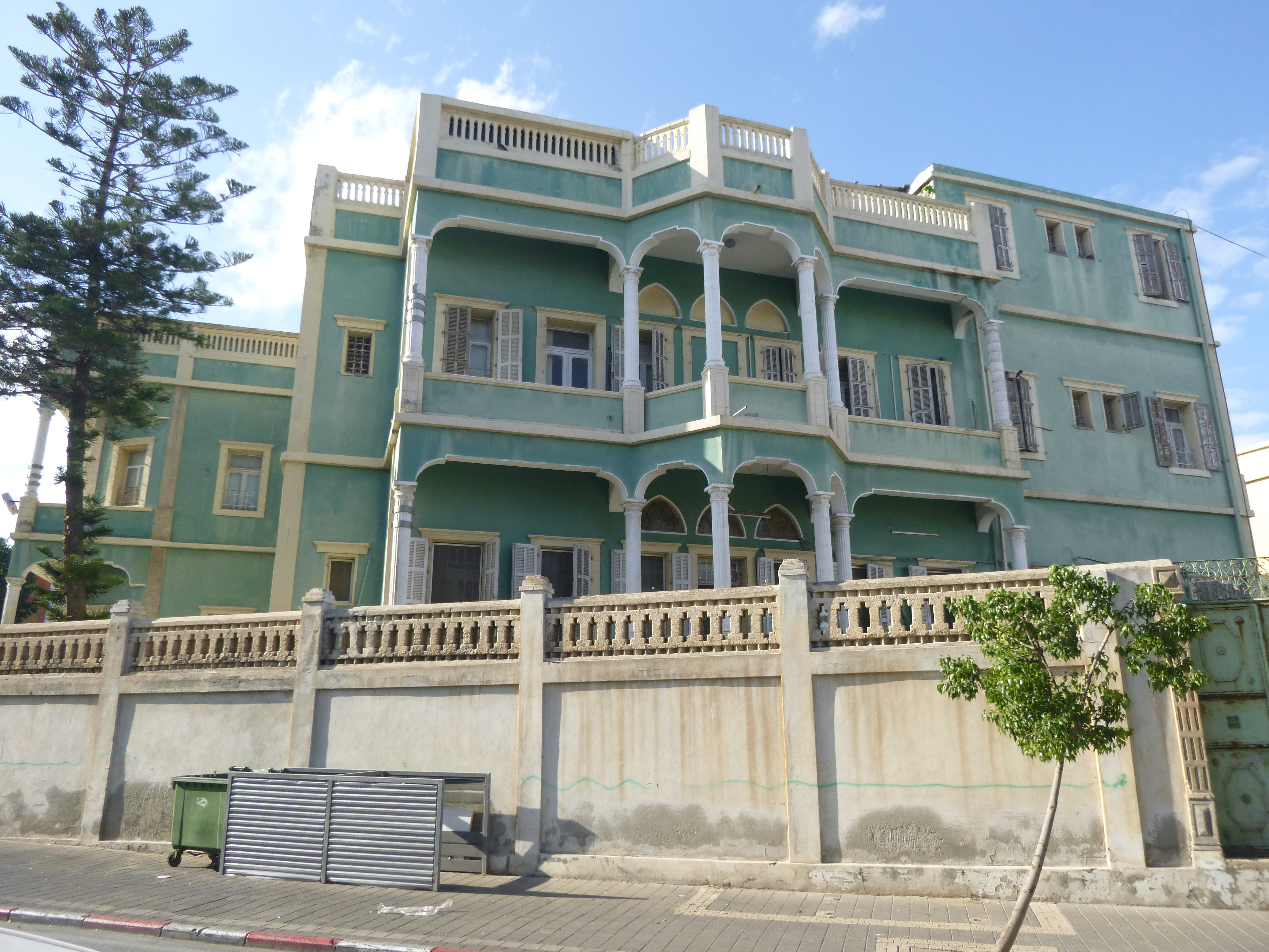 Arabischer Eklektizismus in Tel Aviv-Jaffa, Israel; hier das Grüne Haus.